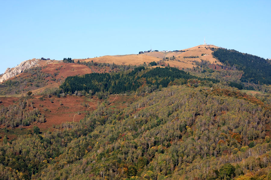 Il Mottarone visto dalle pendici del Monte Falò